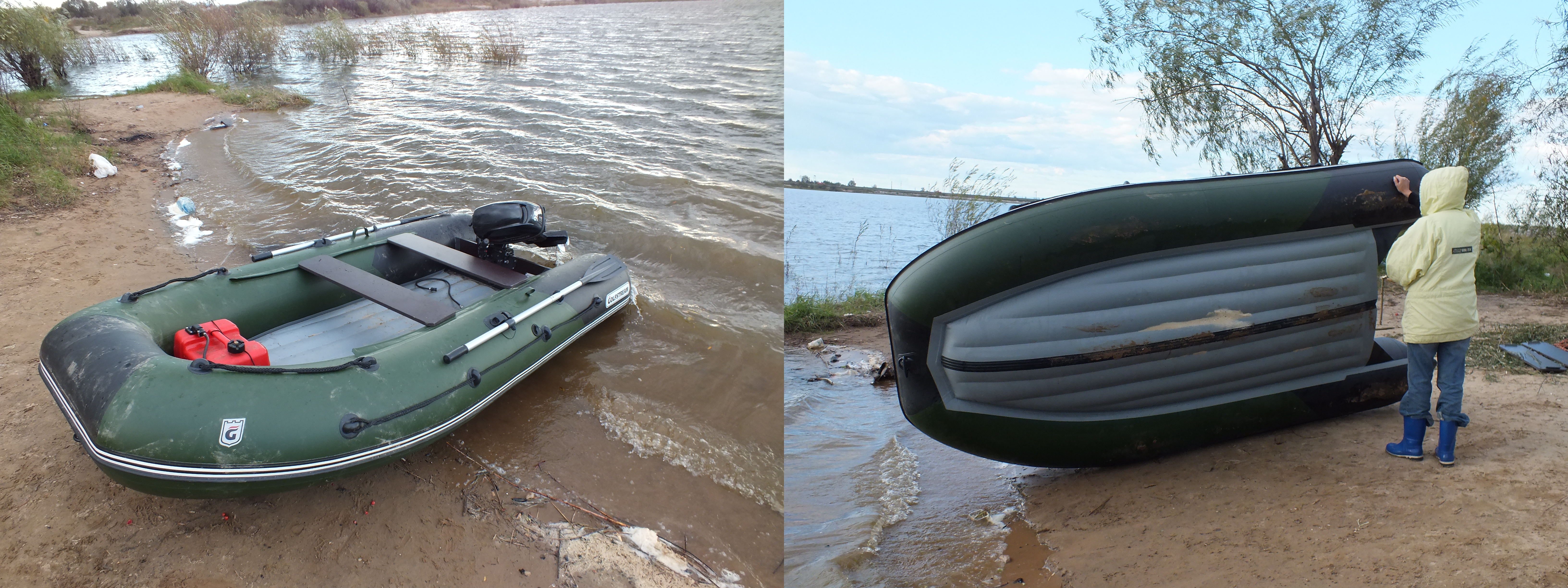 Надувная лодка с надувным днищем низкого давления